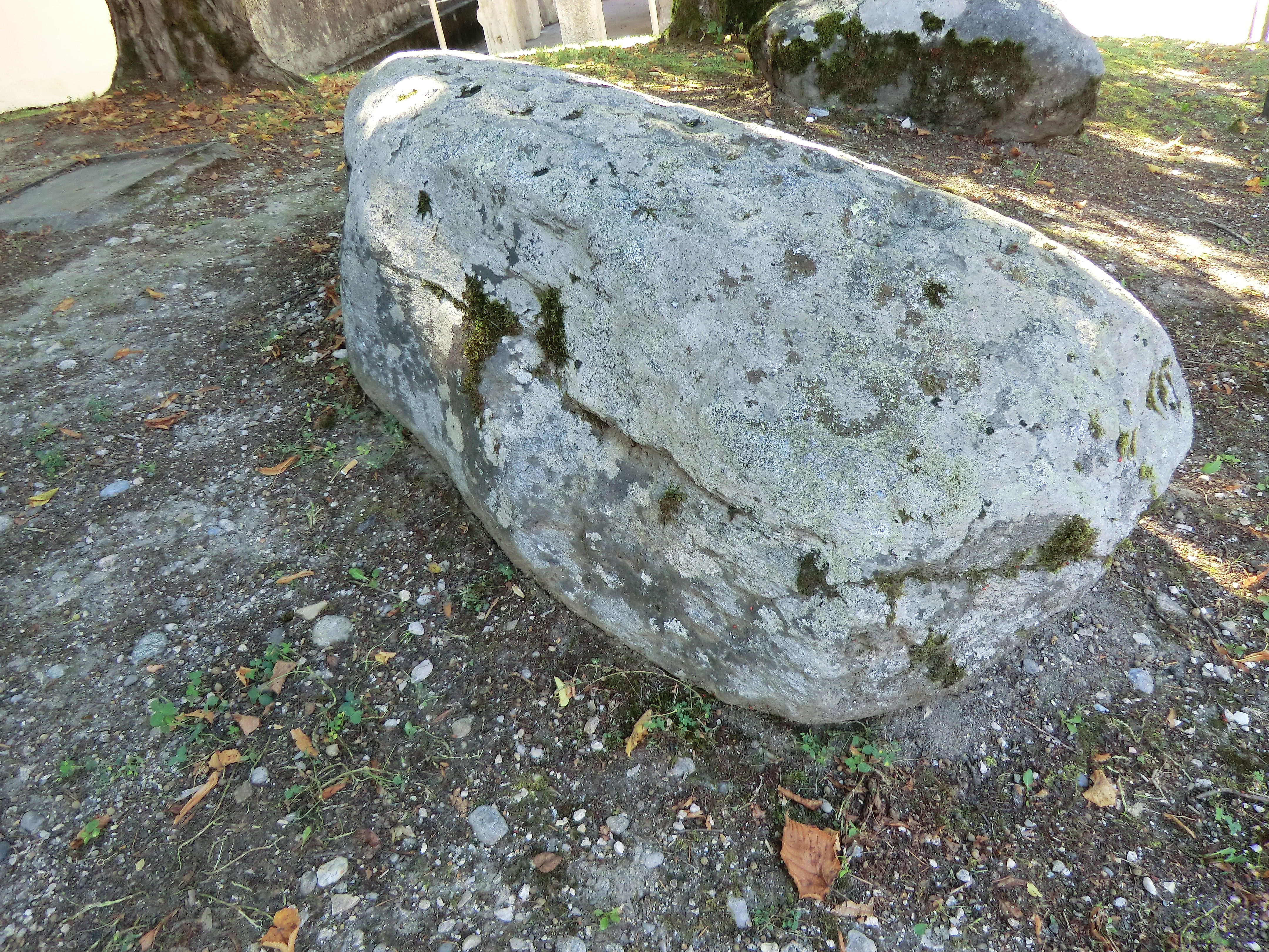 Pierre à cupules de Magnieu (Belley).